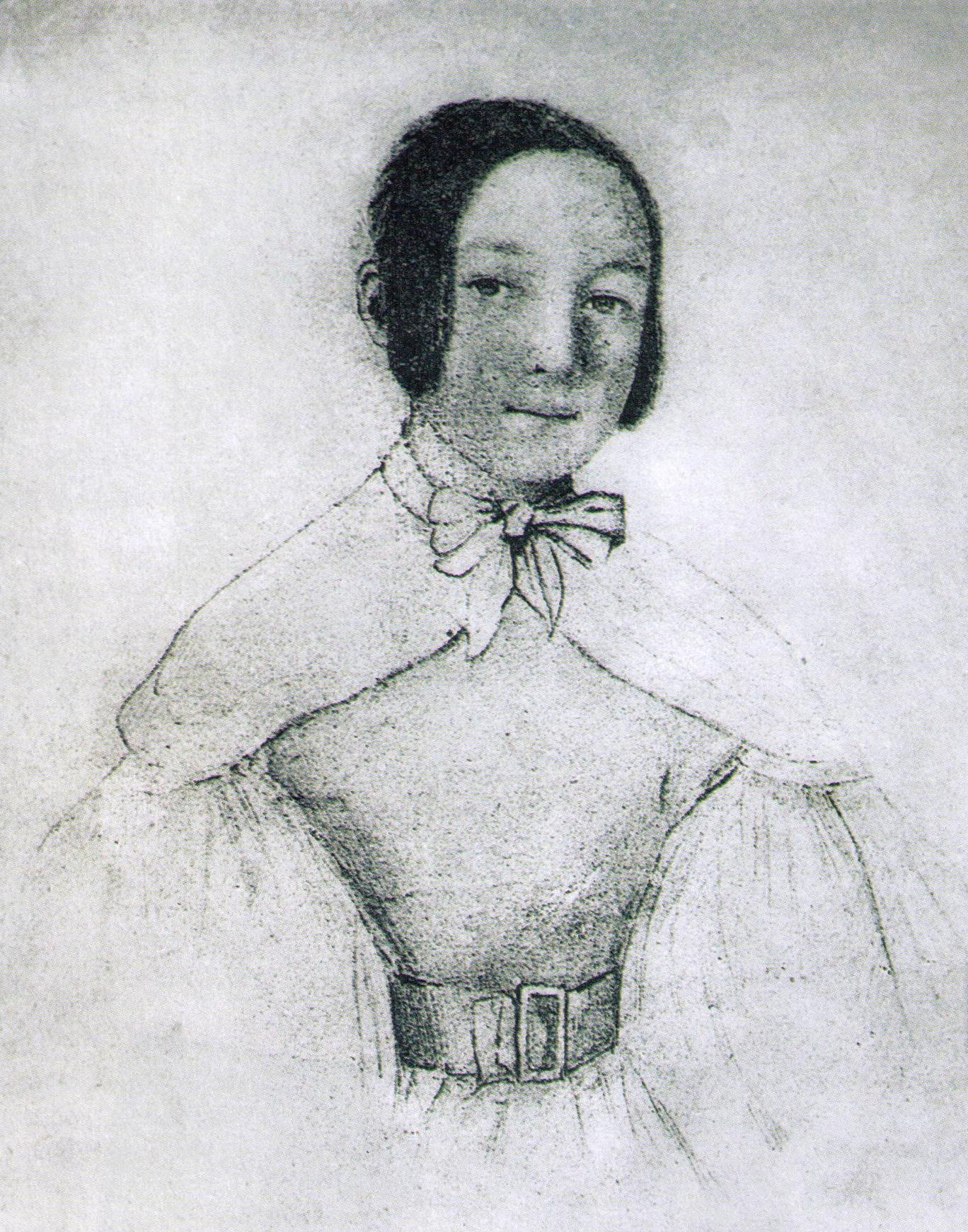 Maria Wodzińska w wieku 17 lat